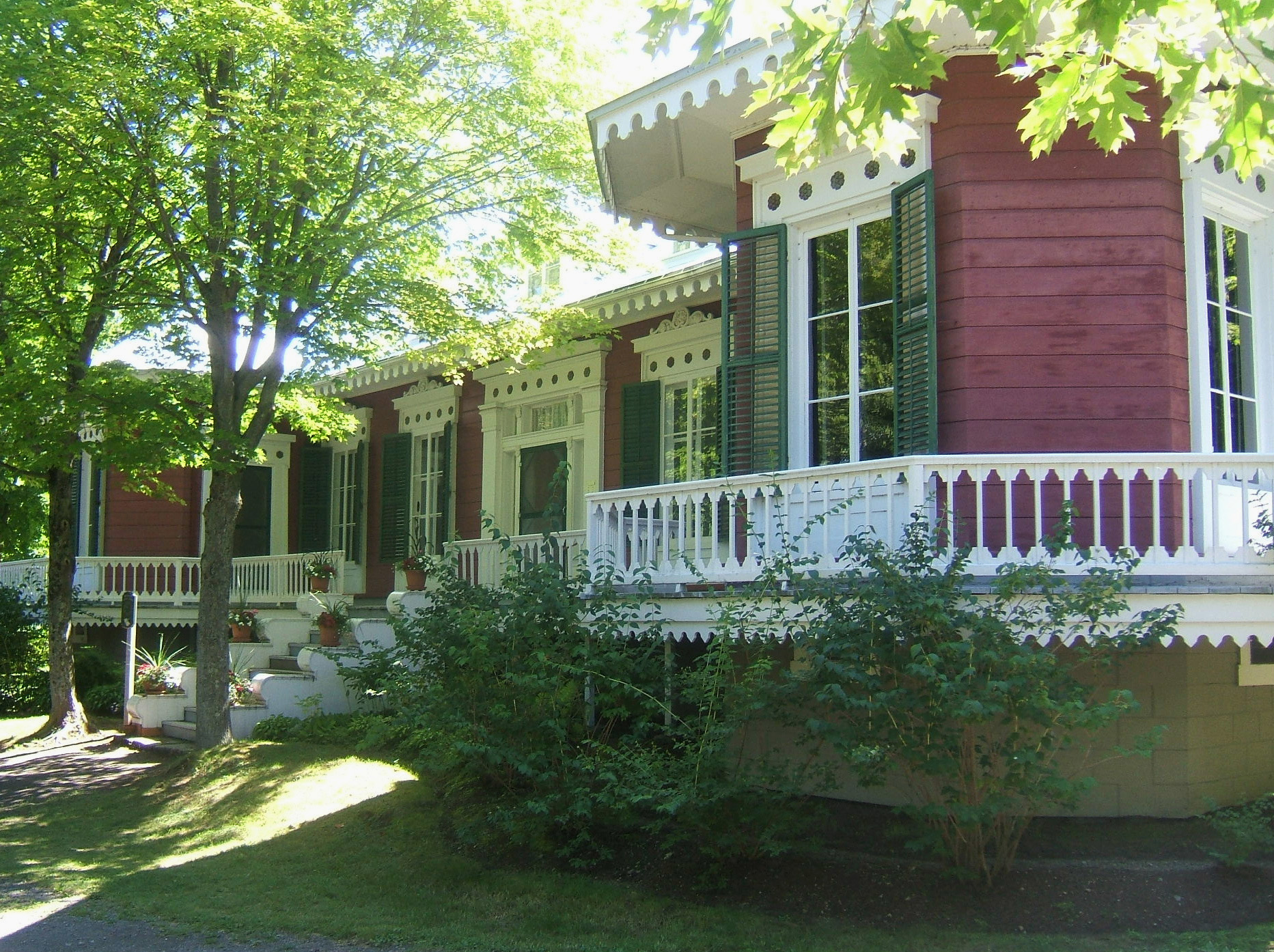 Vue du manoir Dionne, à Saint-Roch-des-Aulnaies, au Québec, Canada. Classé monument historique en 1965.